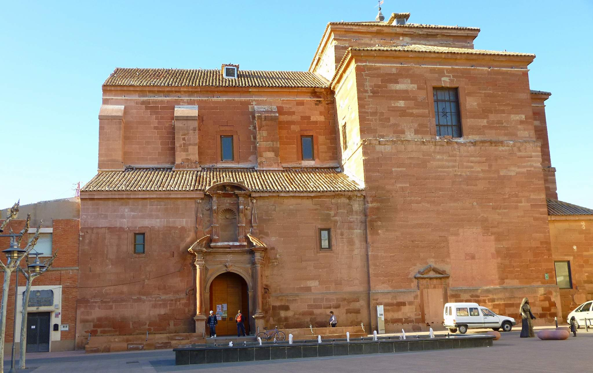 Iglesia de Santa Quiteria (Alcázar de San Juan, Ciudad Real)